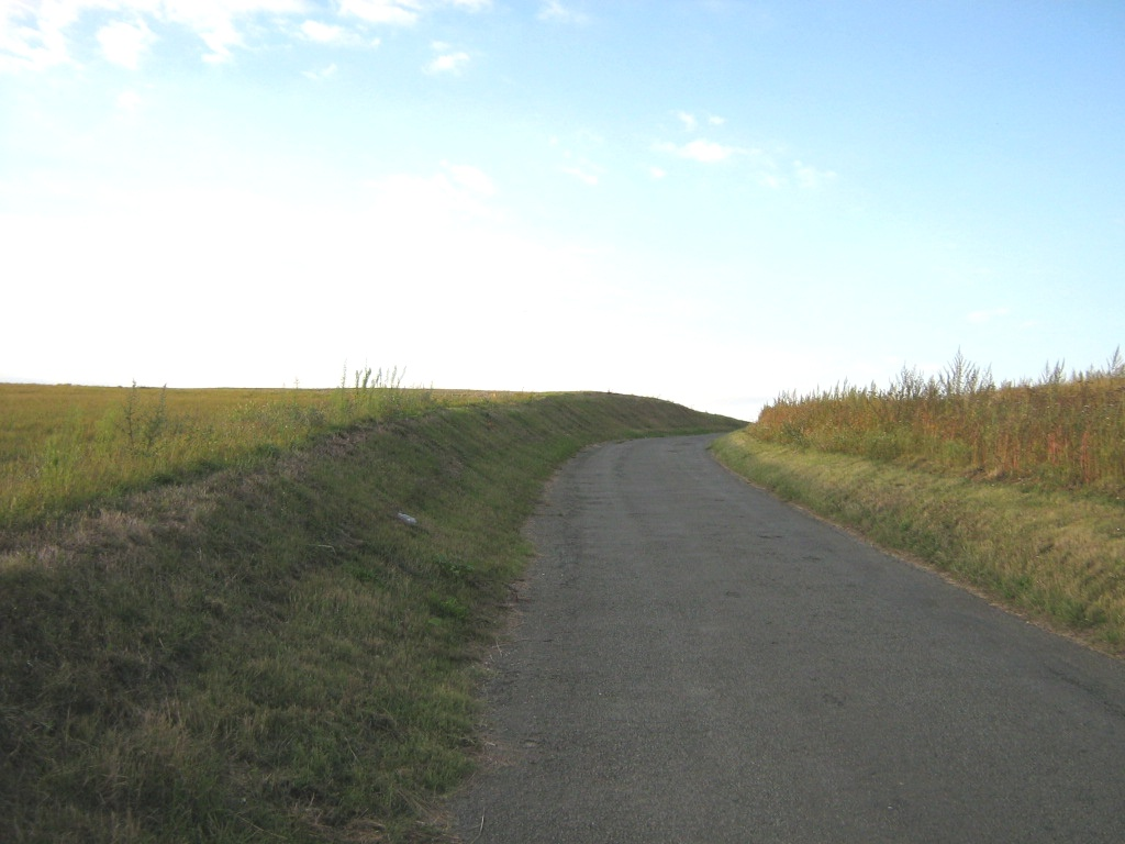 Chemin d'Immermont, à la sortie d'Immarmont vers Génicourt.